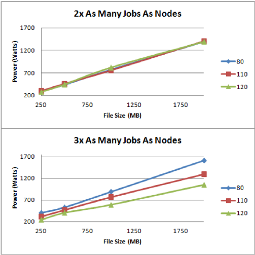 Consommation électrique d'un noeud en fonction de la température d'un noeud et de la taille du fichier a traité